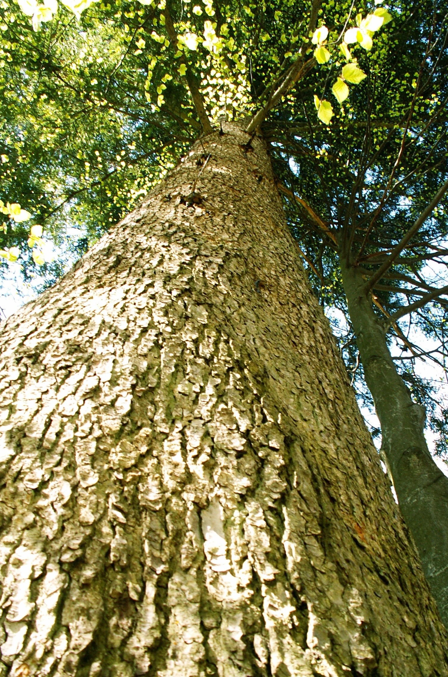 Pogled v krošnjo Črmošnjiške jelke oz. Kraljice Roga